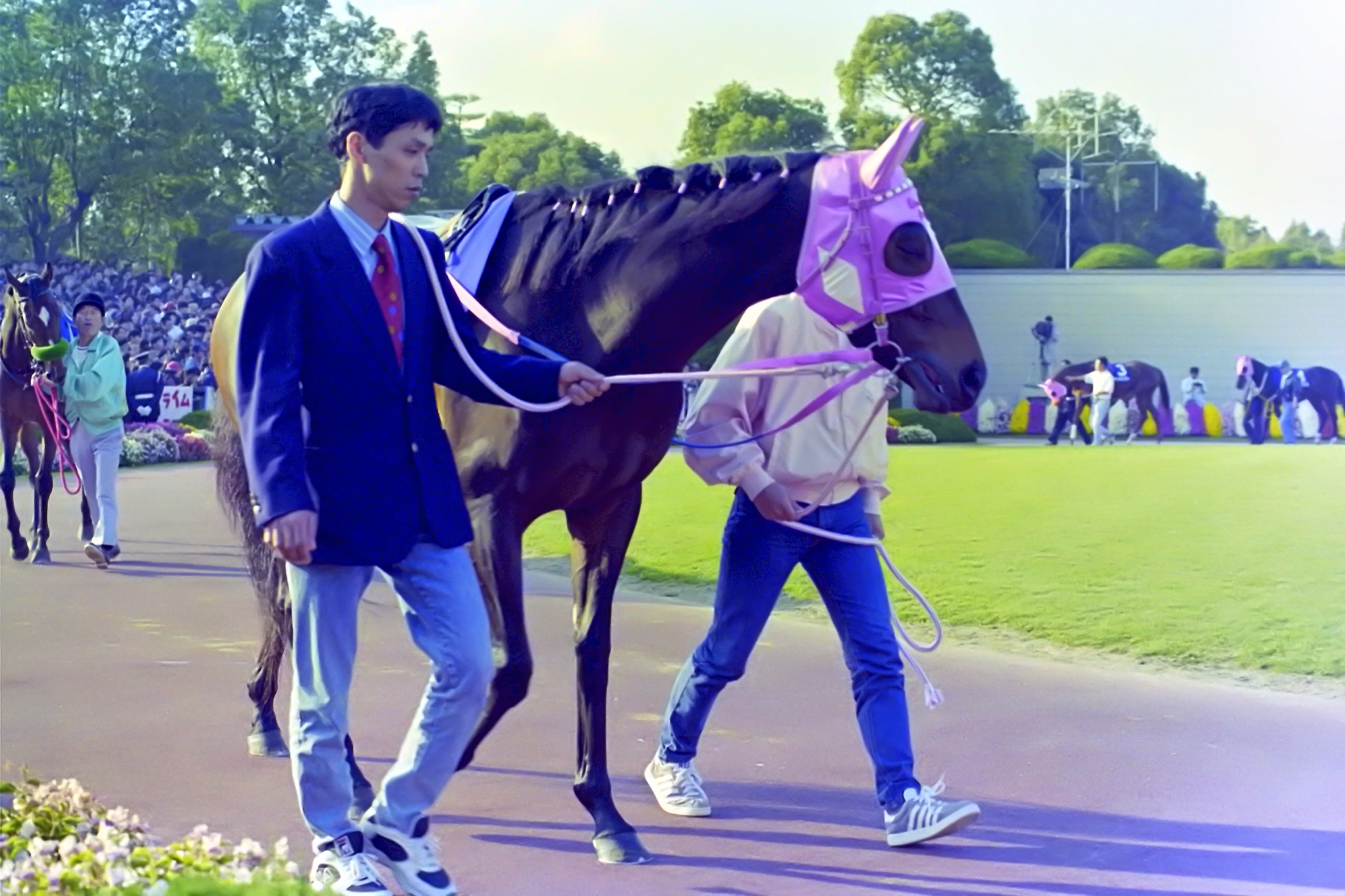 ワンダーパフューム 1995年11月12日 京都競馬場